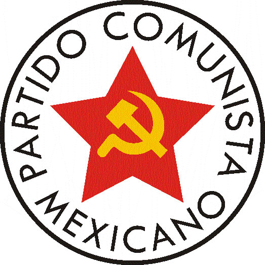 Emblema del antiguo Partido Comunista Mexicano (PCM). El PCM fue liquidado como partido político en 1981 al fusionarse con otras organizaciones. Al ocurrir esto desapareció como entidad legal ante la ley mexicana. Seal of the old Mexican Communist Party (PCM). The PCM was liquidated as a political party in 1981 when it fused with other organizations. The PCM was disappeared as a legal entityt under Mexican electoral law.